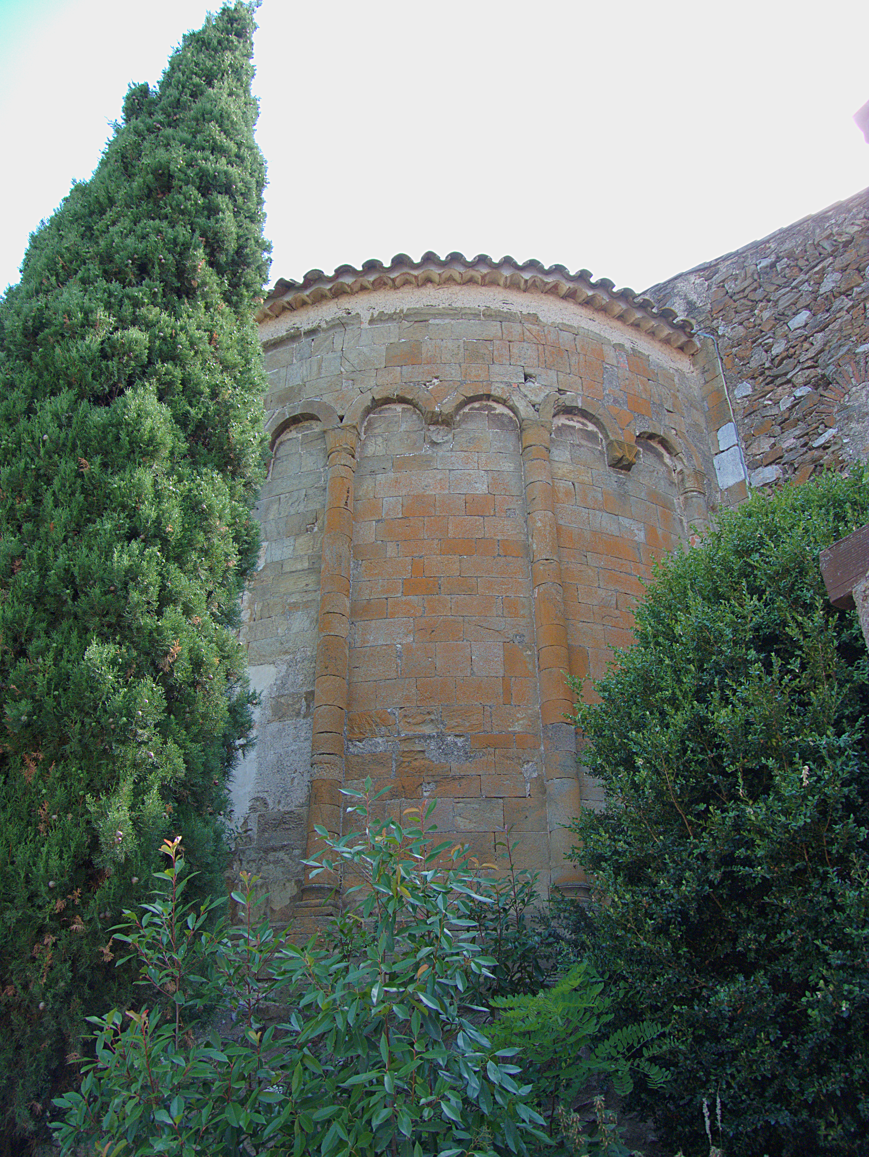 Abside de l'église paroissiale Saint-Félix, Calmeilles (Pyrénées-Orientales, Languedoc-Roussillon, France)